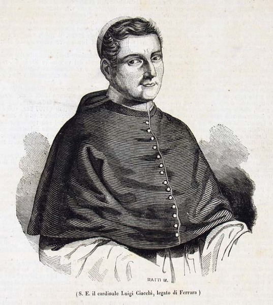 Der italienische Kardinal und Kardinalstaatssekretär Luigi Ciacchi (1788-1865)